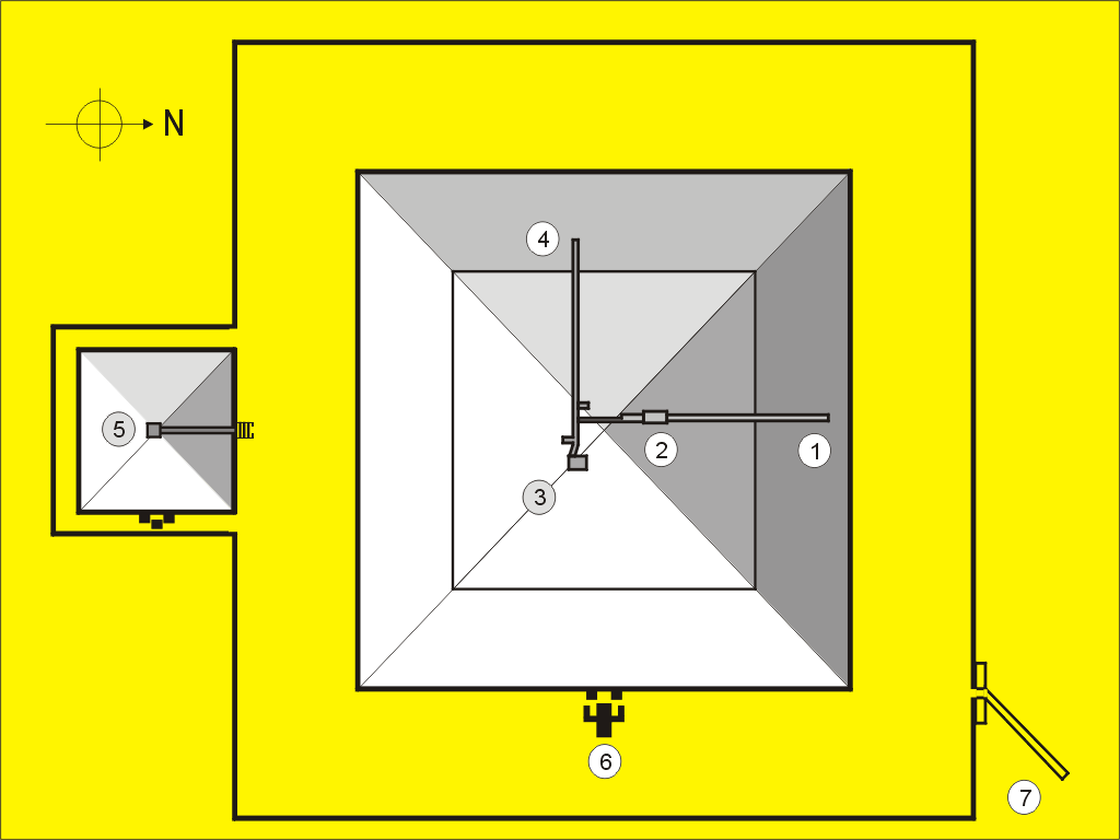 Schematyczny rysunek, przedstawiający plan Piramidy Łamanej w Dahszur.